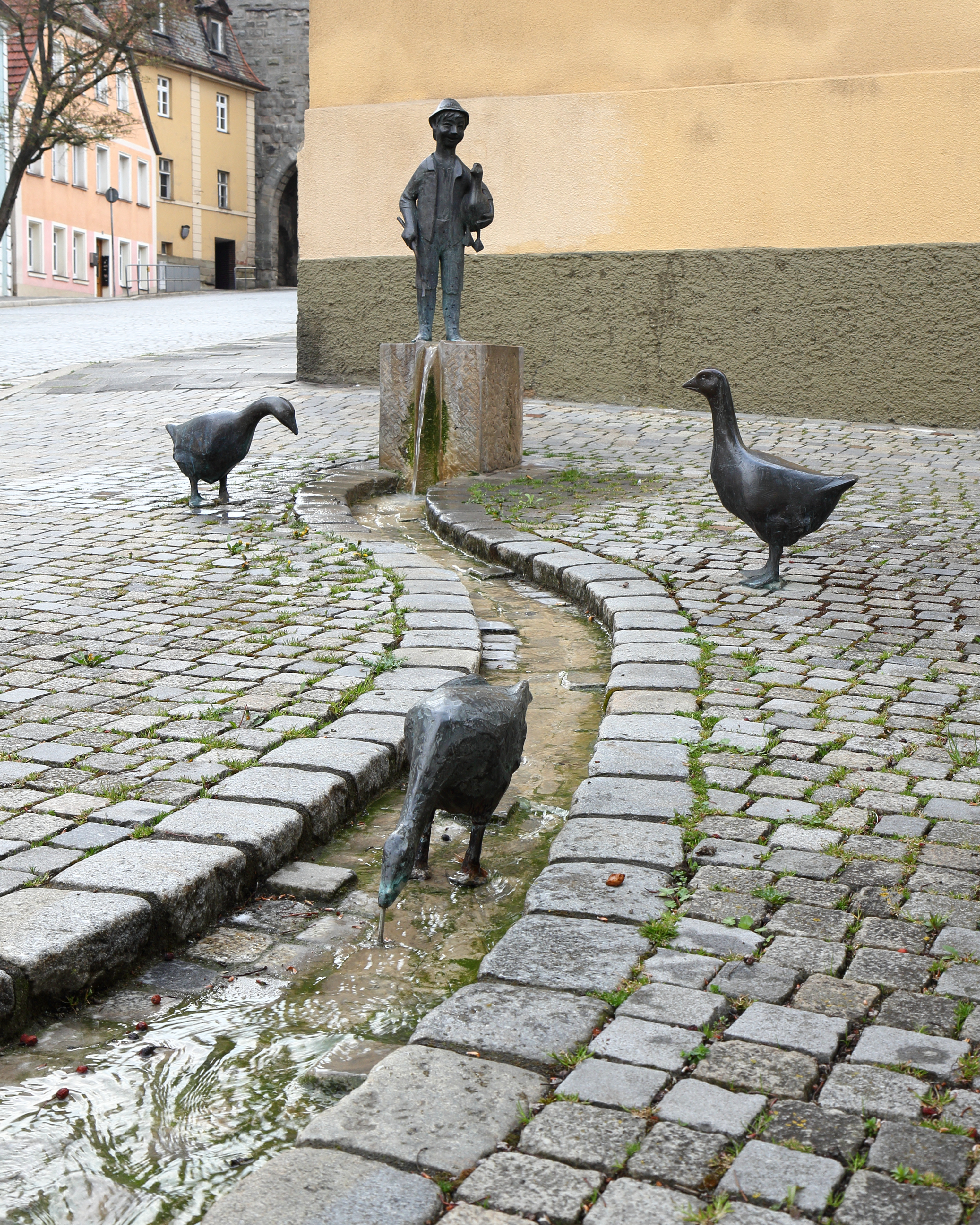 Neustadt an der Aisch - Max-Döllner-Platz - Gänsebrunnen